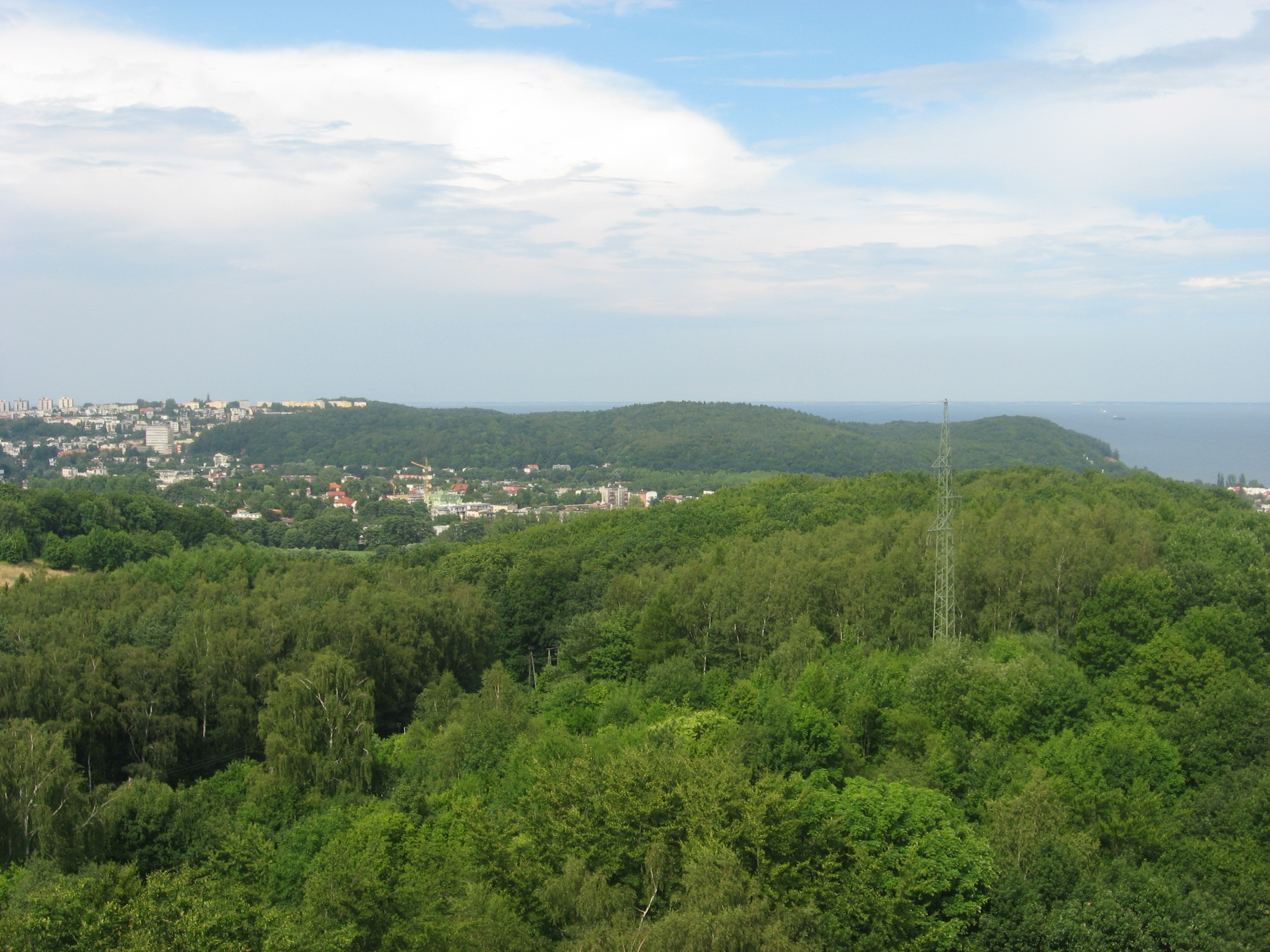 Rezerwat przyrody Kępa Redłowska w Gdyni. Widok z tarasu widokowego "Orange Gdynia Kolibki".